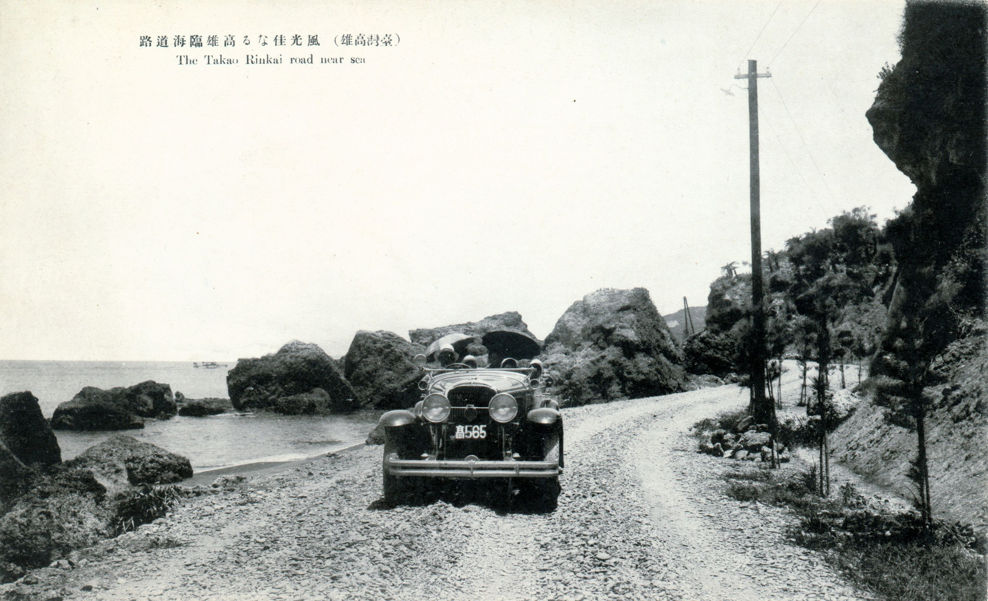 中文（台灣）: 風光明媚的高雄臨海道路